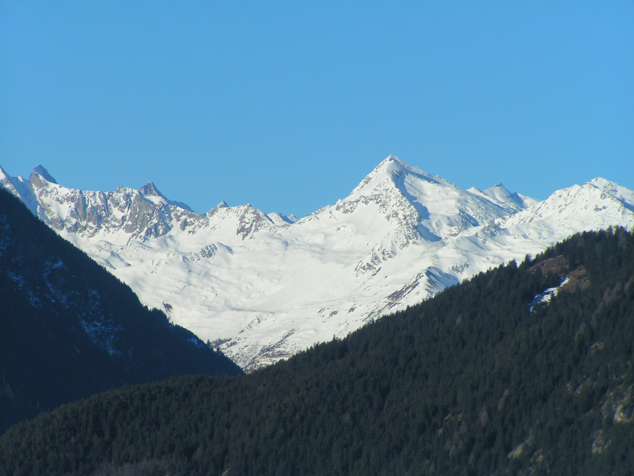 Pizzo Lucendro visto dalla Valle Leventina